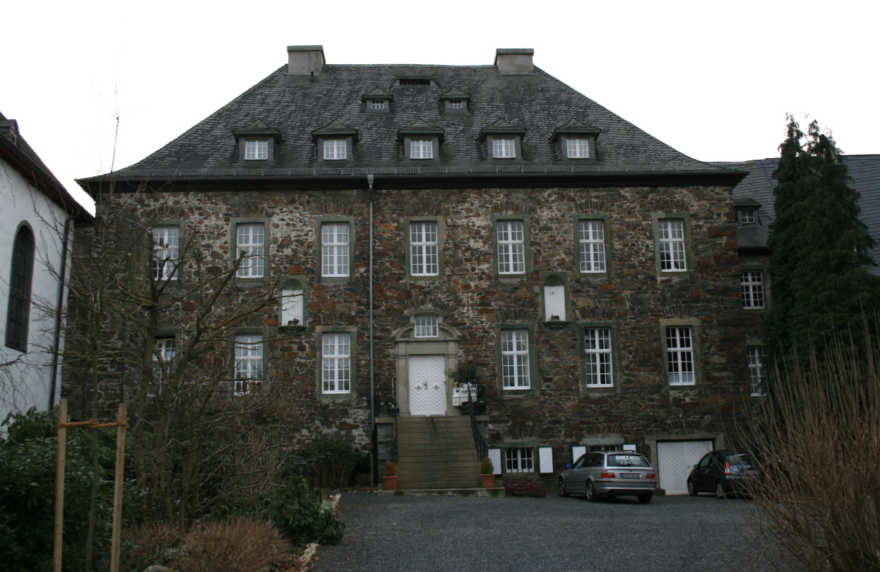 Ehemaliges Kloster Rumbeck in Arnsberg, Stadtteil Rumbeck.